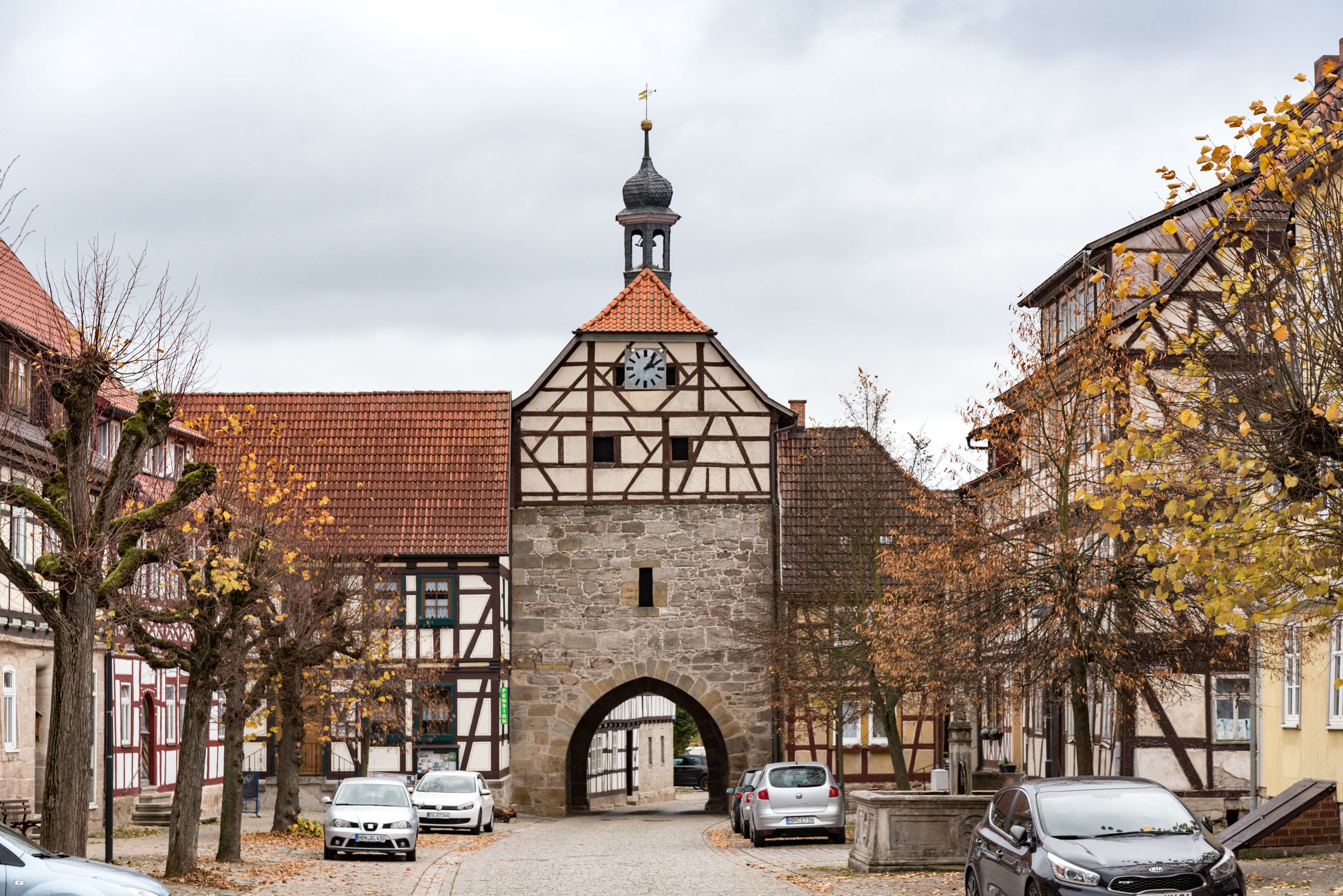 Heldburg, Schuhmarkt, Unteres Tor